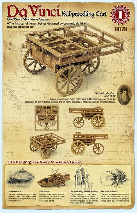 Maquette d'après les dessins de Leonard de Vinci concernant un chariot tricycle à propulsion automatique